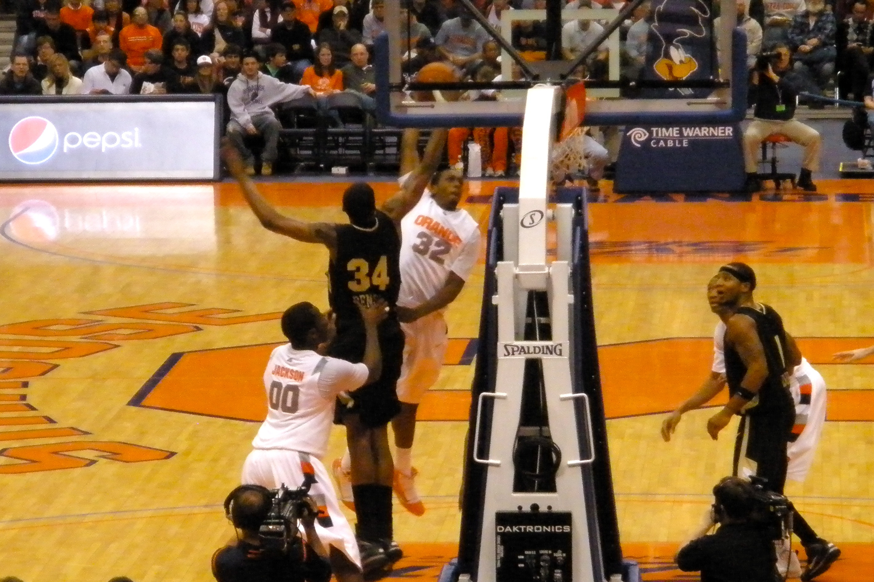 Kris Joseph dunk attempt